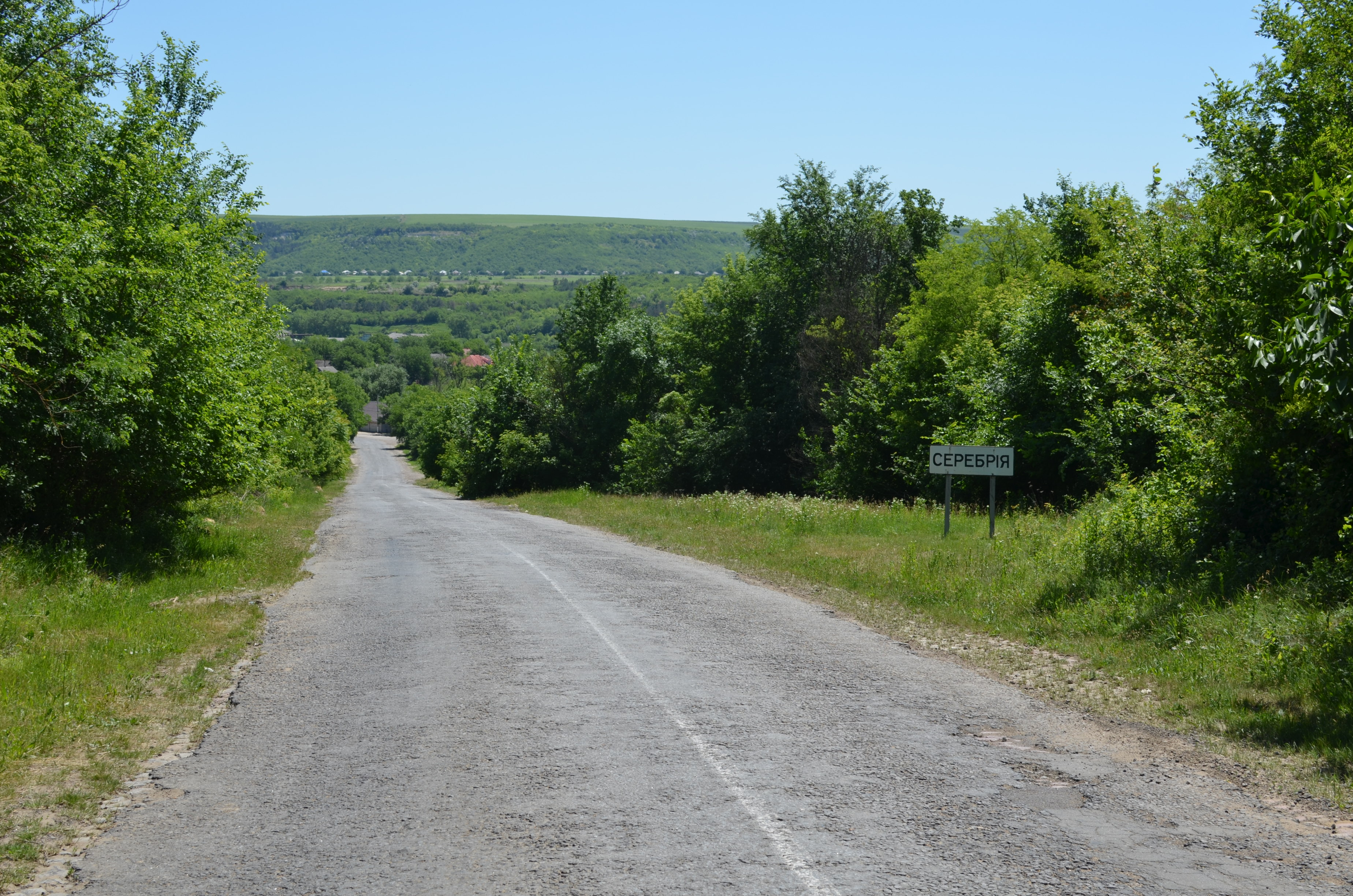 с. Серебрія. Панорама села.